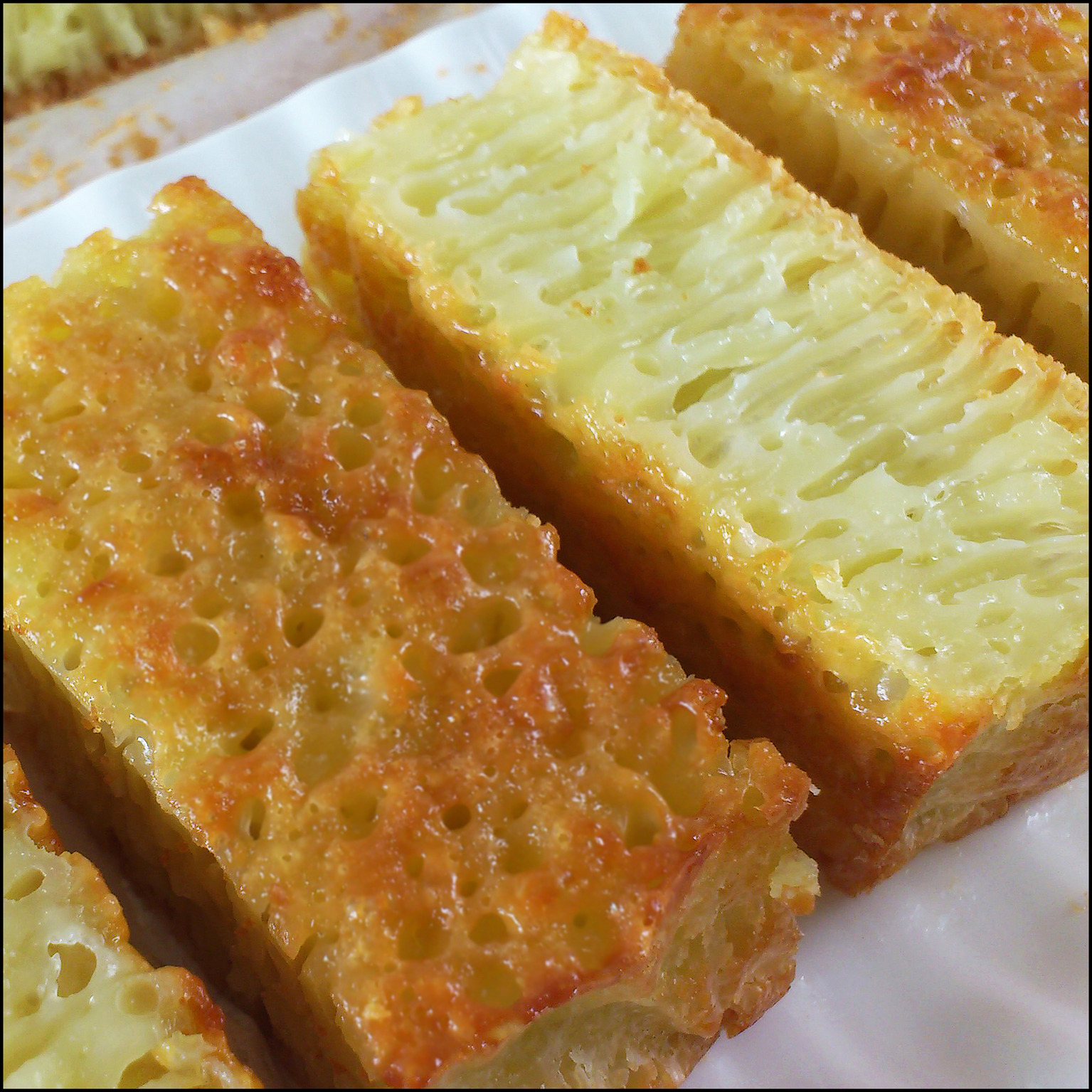 Imagen de un trozo de Bika Ambon.